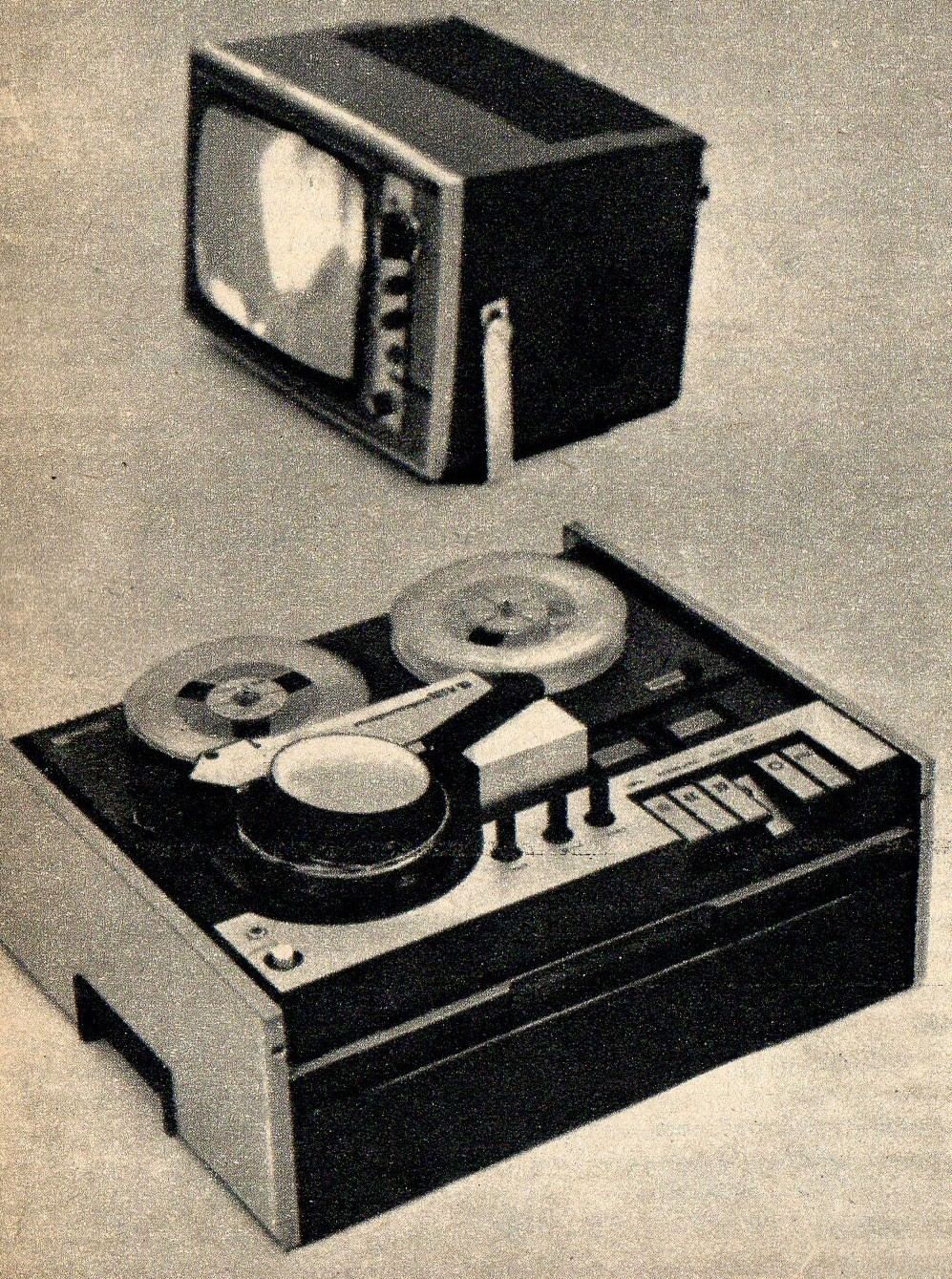 Polski magnetowid MTV-10.